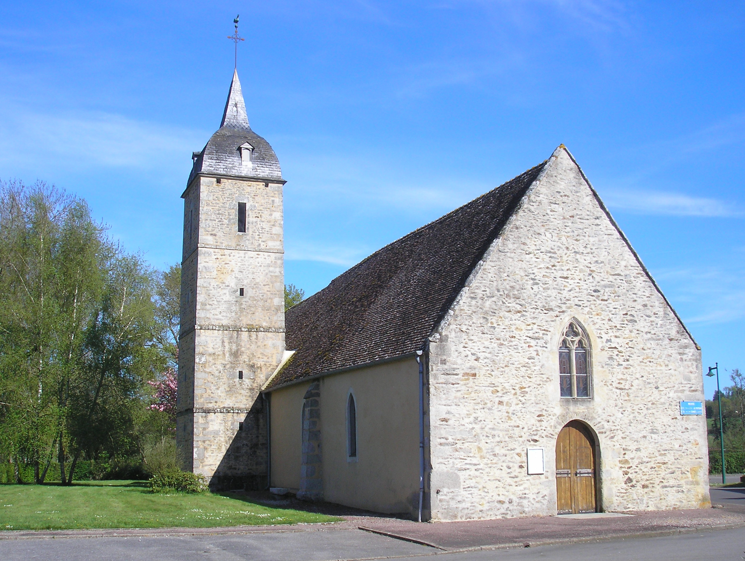 Mieuxcé (Normandie, France). L'église Saint-Pierre-et-Saint-Paul.